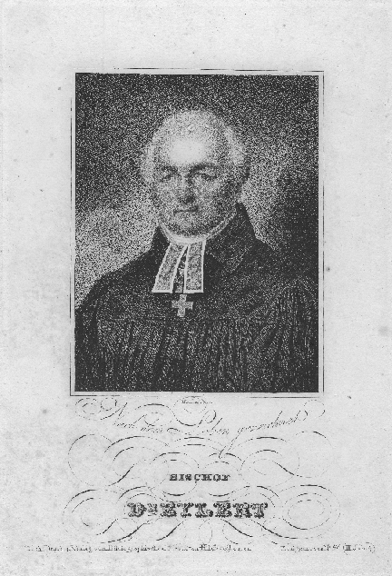 Bischof Dr. Eylert, Stahlstich um 1806 von Nordmann